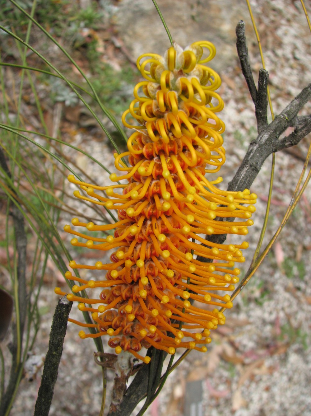 Grevillea excelsior, Maranoa Gardens, Balwyn, Victoria, Australia